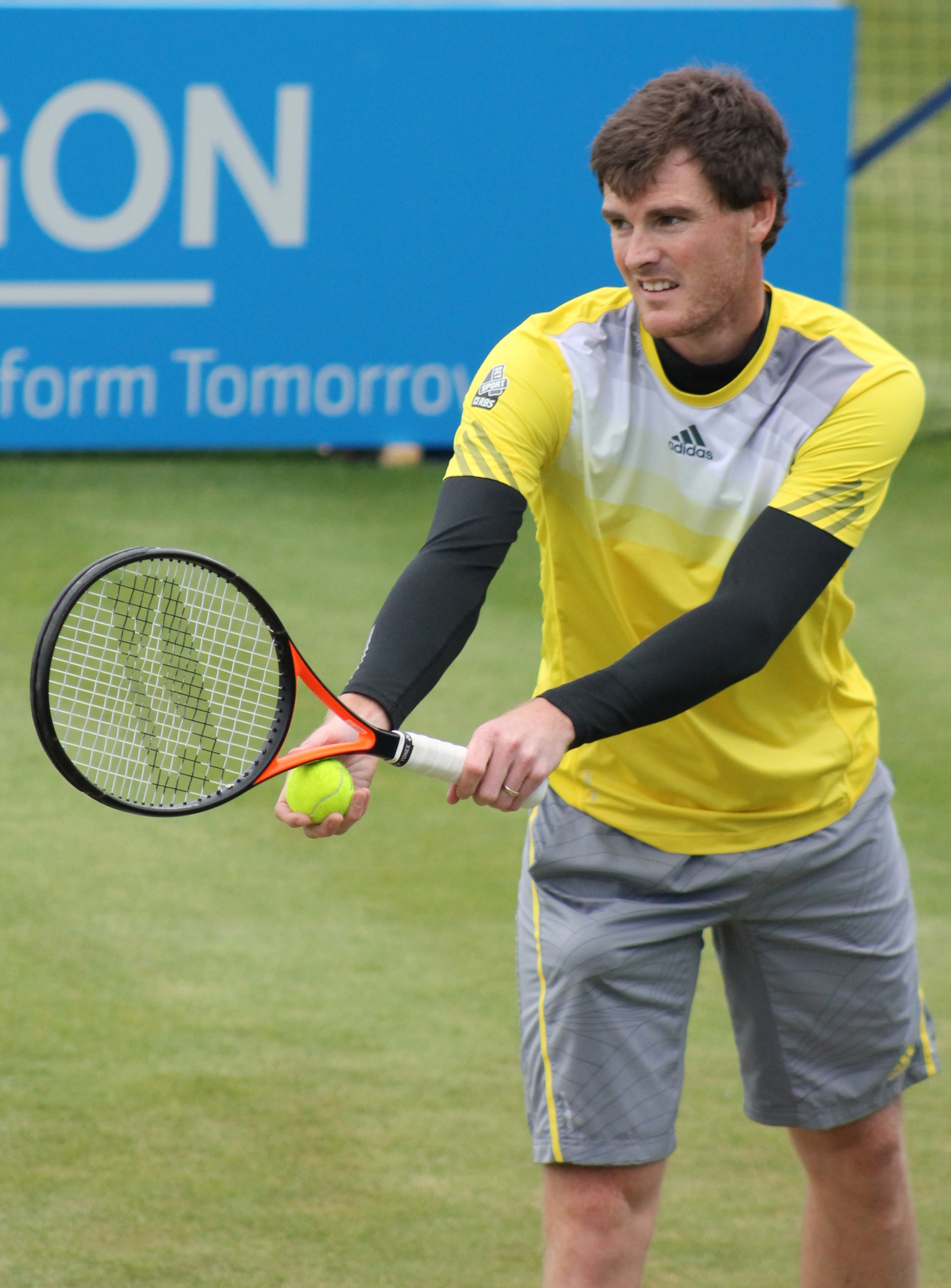 Murray J. QC13-016